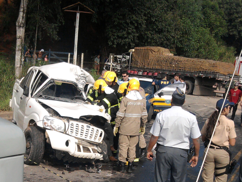 Acidente no km 231 da BR-101 em Fundão, Espírito Santo. Cinco pessoas morreram. Na picape branca, vê-se as pernas do corpo de Washington Luiz Gobetti, 41 anos, capitão da Companhia Ambiental da Polícia Militar do Espírito Santo. Na Kombi ao fundo, morreram as outras quatro vítimas.